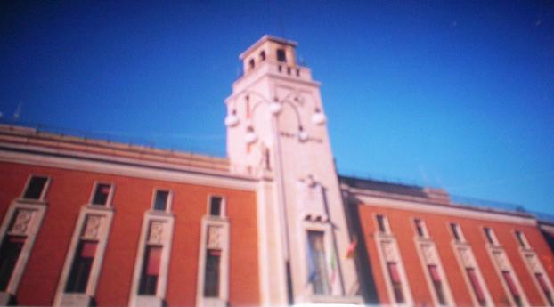 Government Palace, Enna, Italy/Palazzo del Governo, Enna, Italia